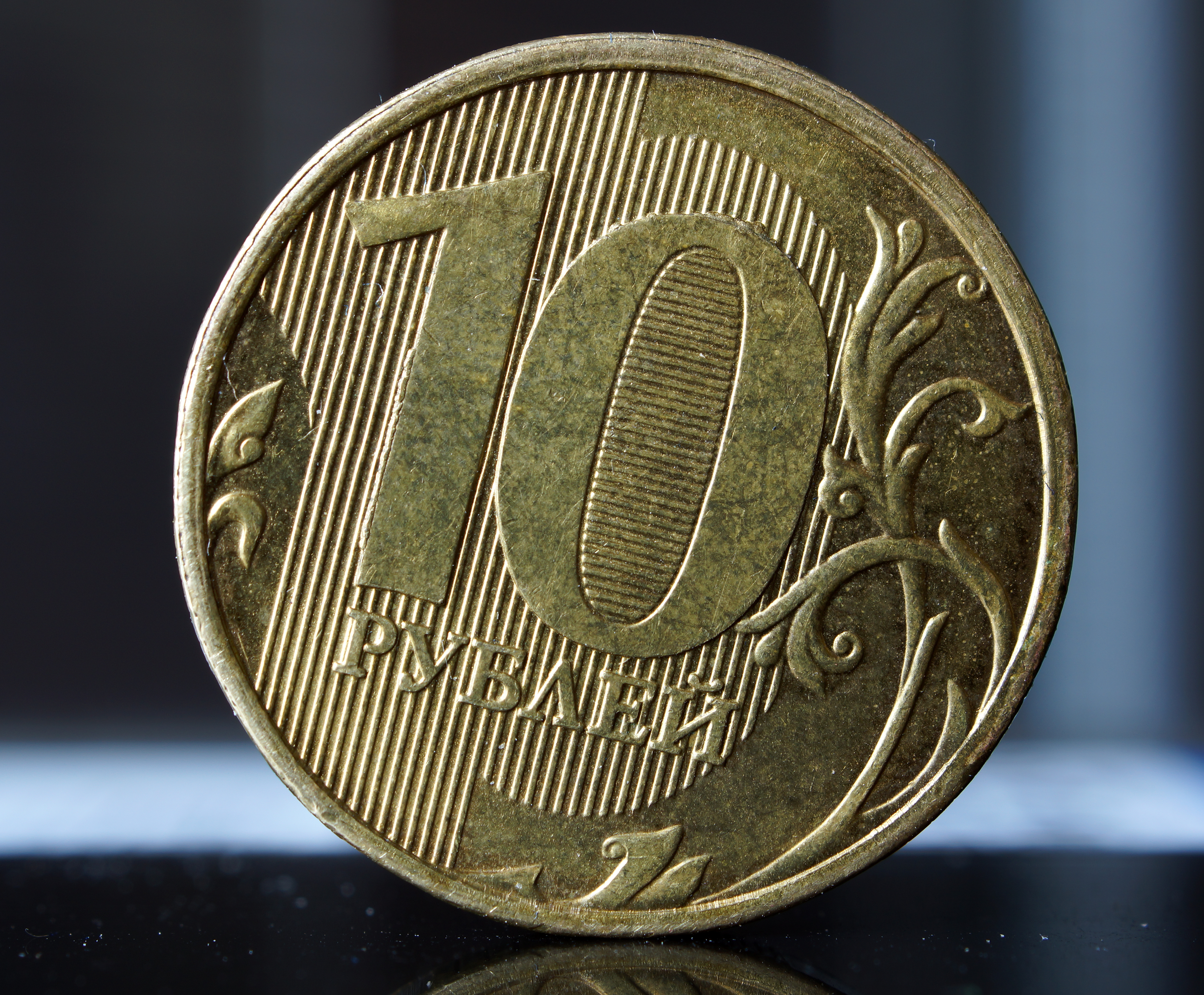 Монета номиналом в 10 российских рублей. 2011 год. Аверс.